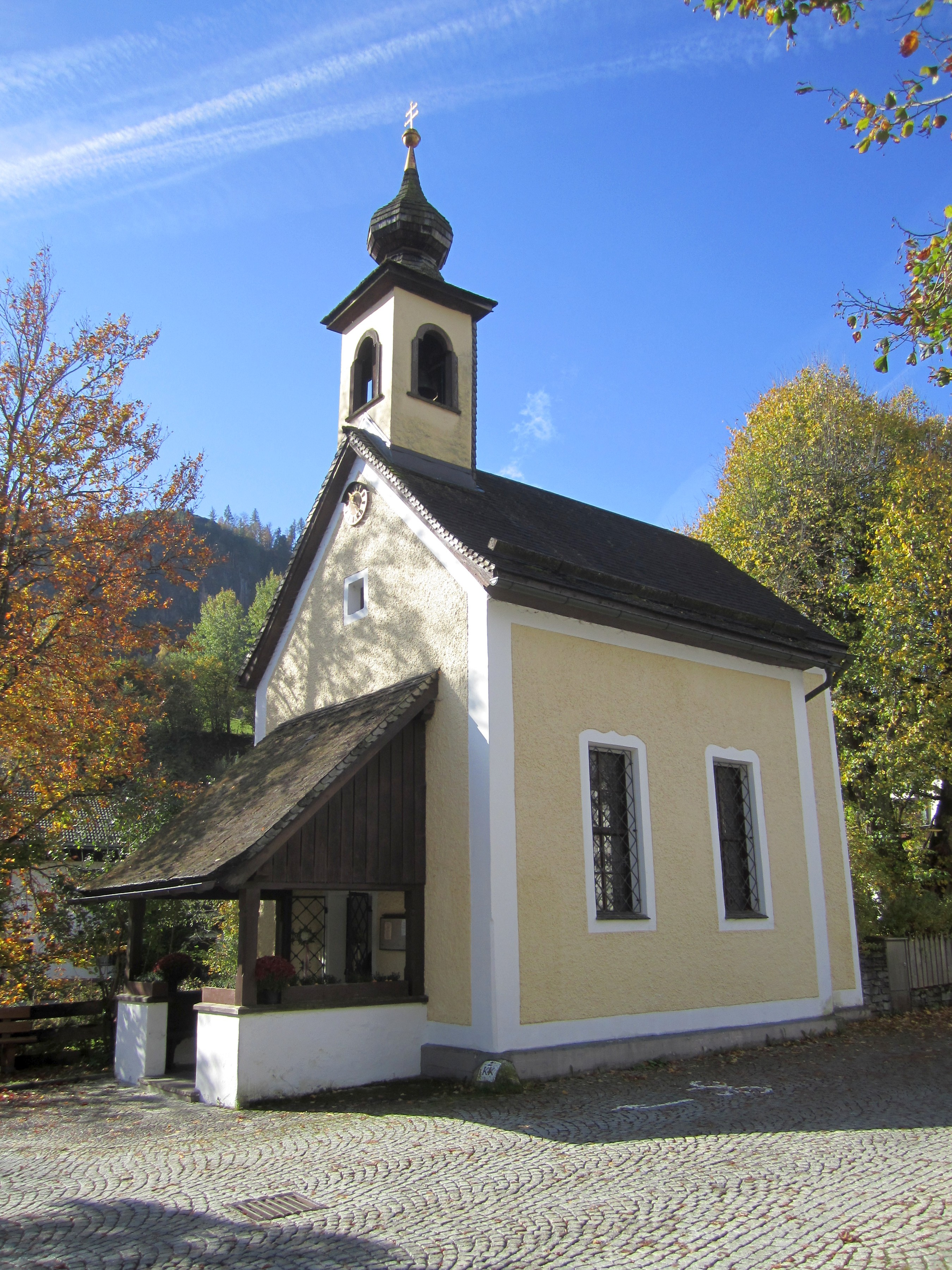 Knappenkapelle St. Anna in Hütten (Leogang), Land Salzburg, Österreich.